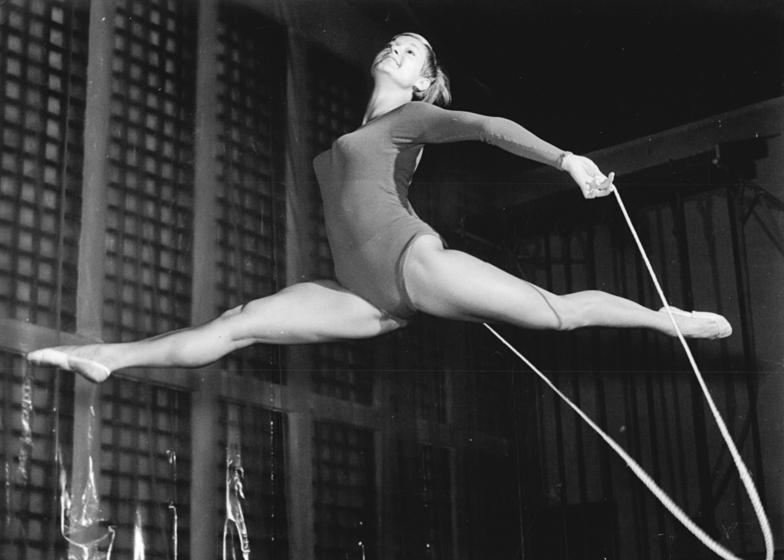 Irene Binder Zentralbild Studré 15.11.1967 Berlin: Vorbereitung Weltmeisterschaften in der Künstlerischen Gymnastik - Irene Binder. Die 25jährige Irene Binder (HSG Wissenschaft DHfK Leipzig), deutsche Meisterin der DDR 1967 (Fünfkampf) in der Künstlerischen Gymnastik, bei einem gekonnten Sprung mit dem Seil. Sie gehört zum DDR-Aufgebot für die Weltmeisterschaften am 18. und 19.11.1967 in Kopenhagen.